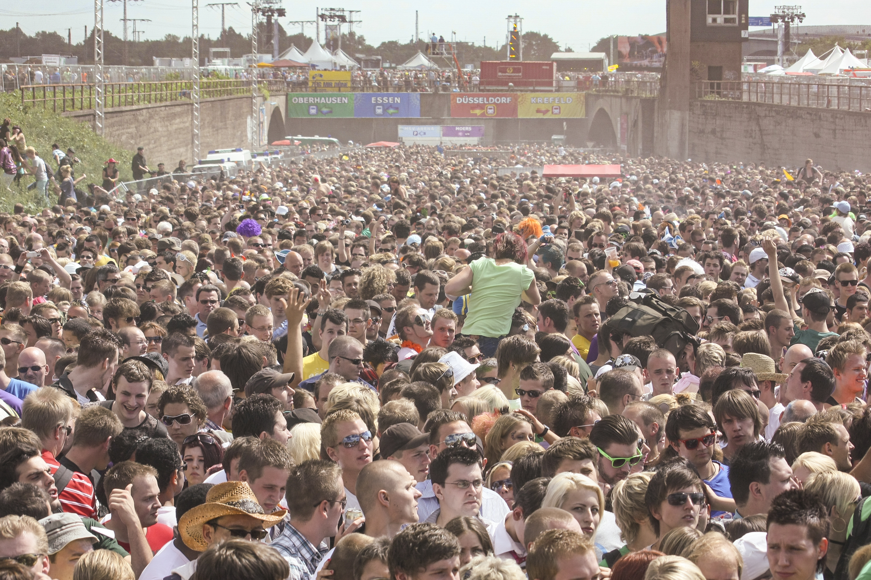 Entry and exit ramp of the Loveparade 2010 at 3:30 p.m., photographed by BILD / McFit Float (No.2), Duisburg, Germany